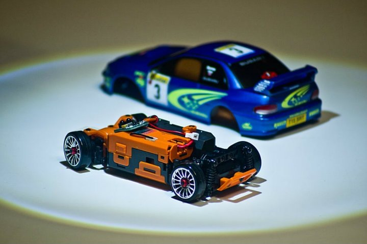 Шасси радиоуправляемой автомодели Kyosho Mini-Z серии AWD